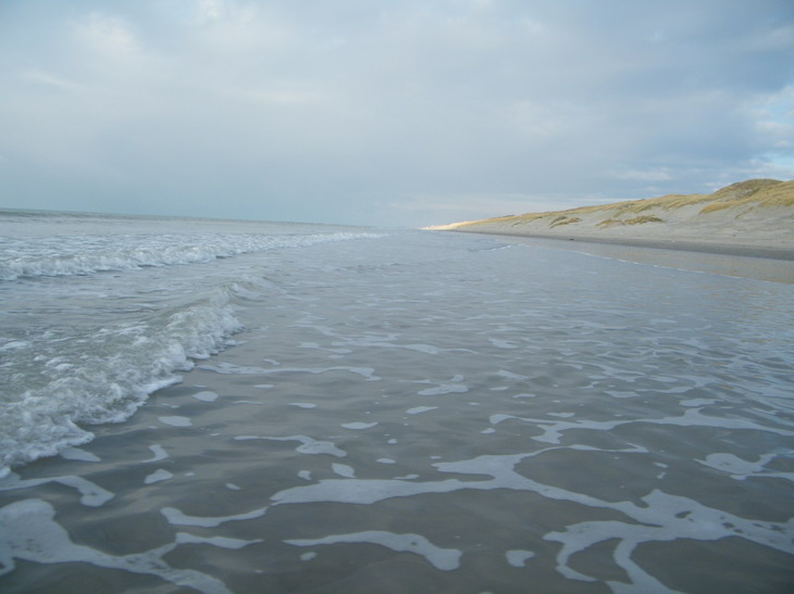 La côte de sable fin est très peu fréquentée à cause de son accès à mériter par un sentier de 3,6 km dans le sable.